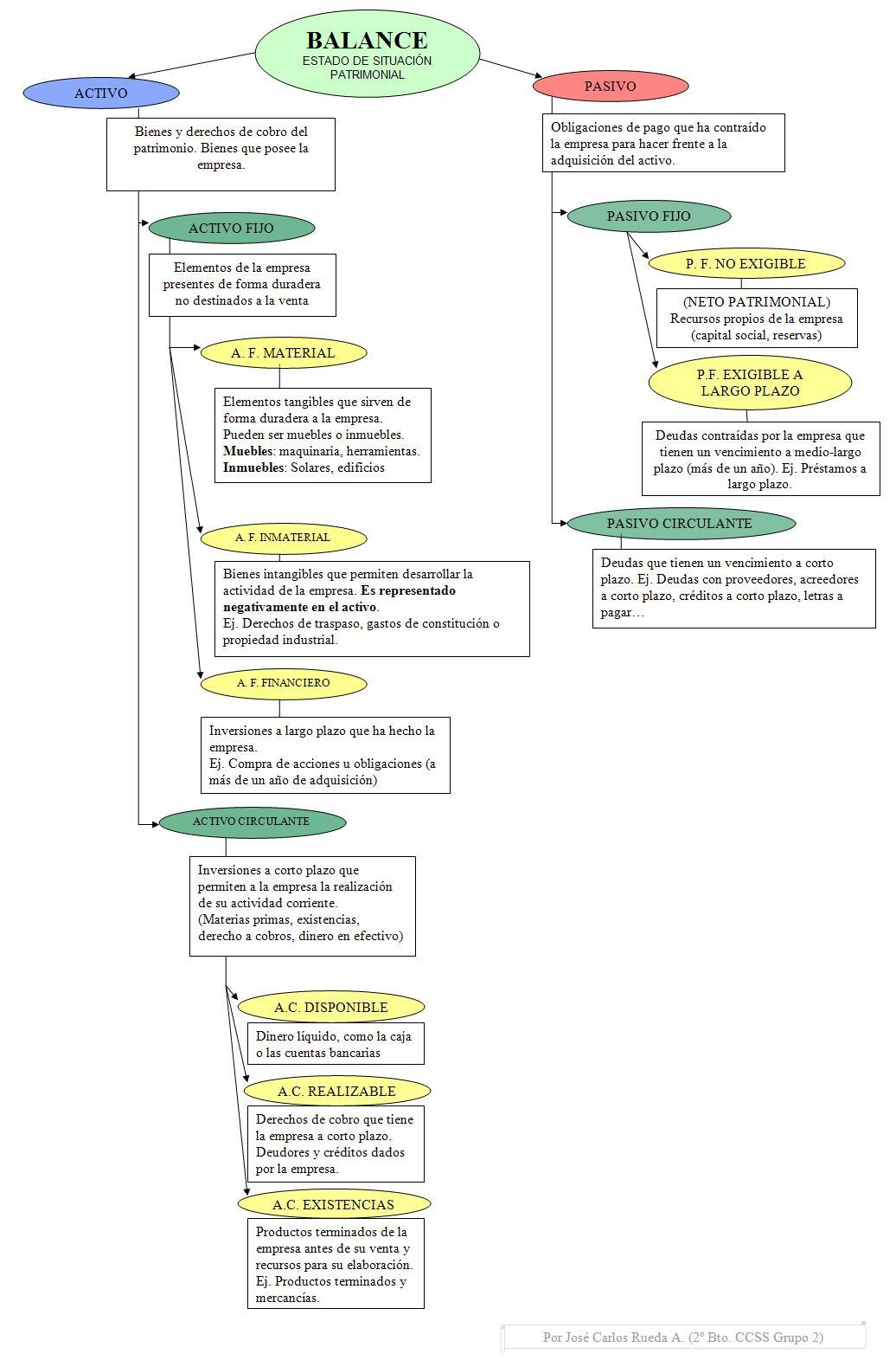 Esquema sobre las partes de un balance en contabilidad